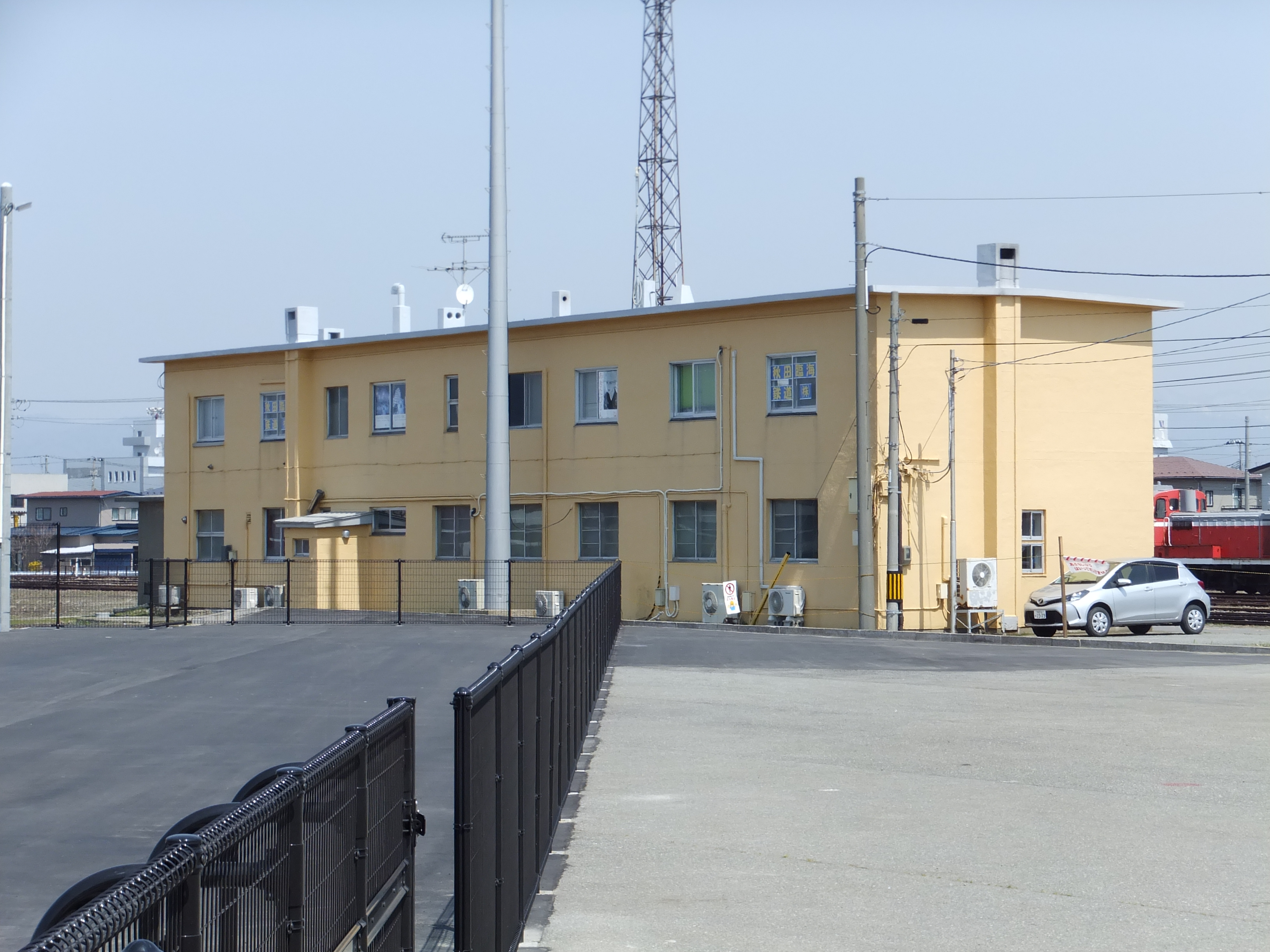 秋田港駅の一角にある秋田臨海鉄道本社